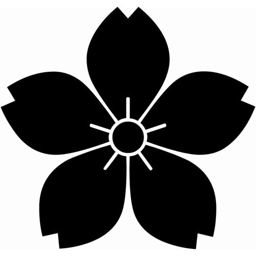 家紋（山桜）